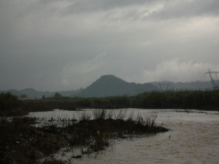 Vista del riu Albaida des de 'la gola' cap al Castellet en Castelló de la Ribera.